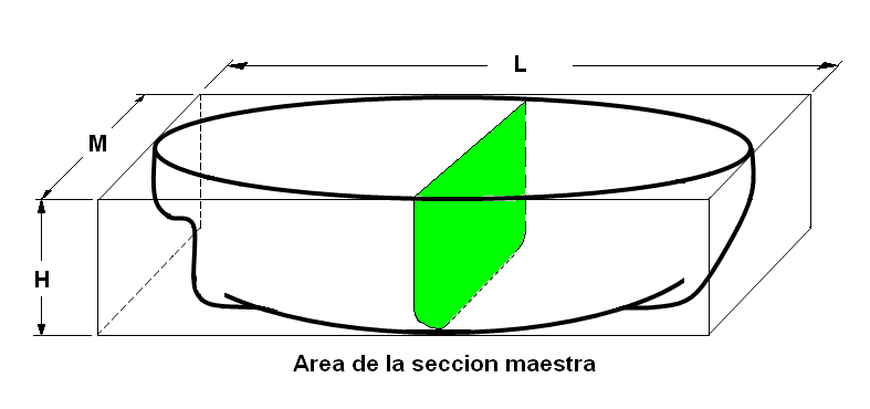 Area de la sección maestra (spanish)(Main section area)